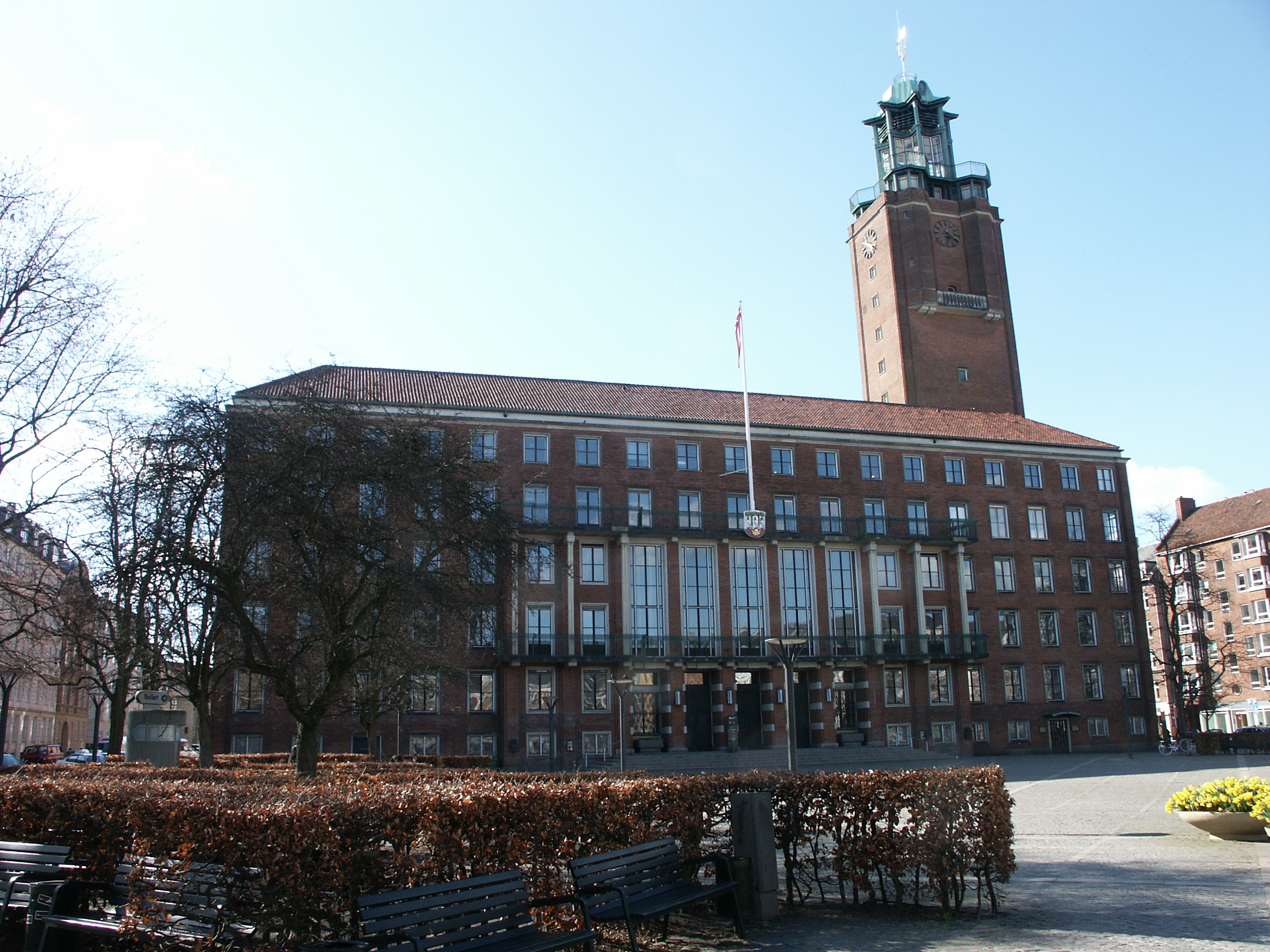 Frederiksberg Town Hall (Frederiksberg Denmark)